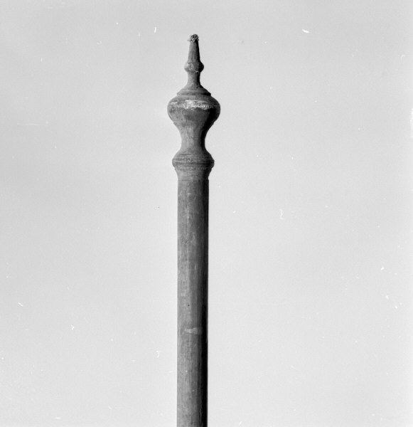 Kyrkstöt av trä, från 1700-talet? Kategori: (11) DiverseKyrkstöt av trä, från 1700-talet?.